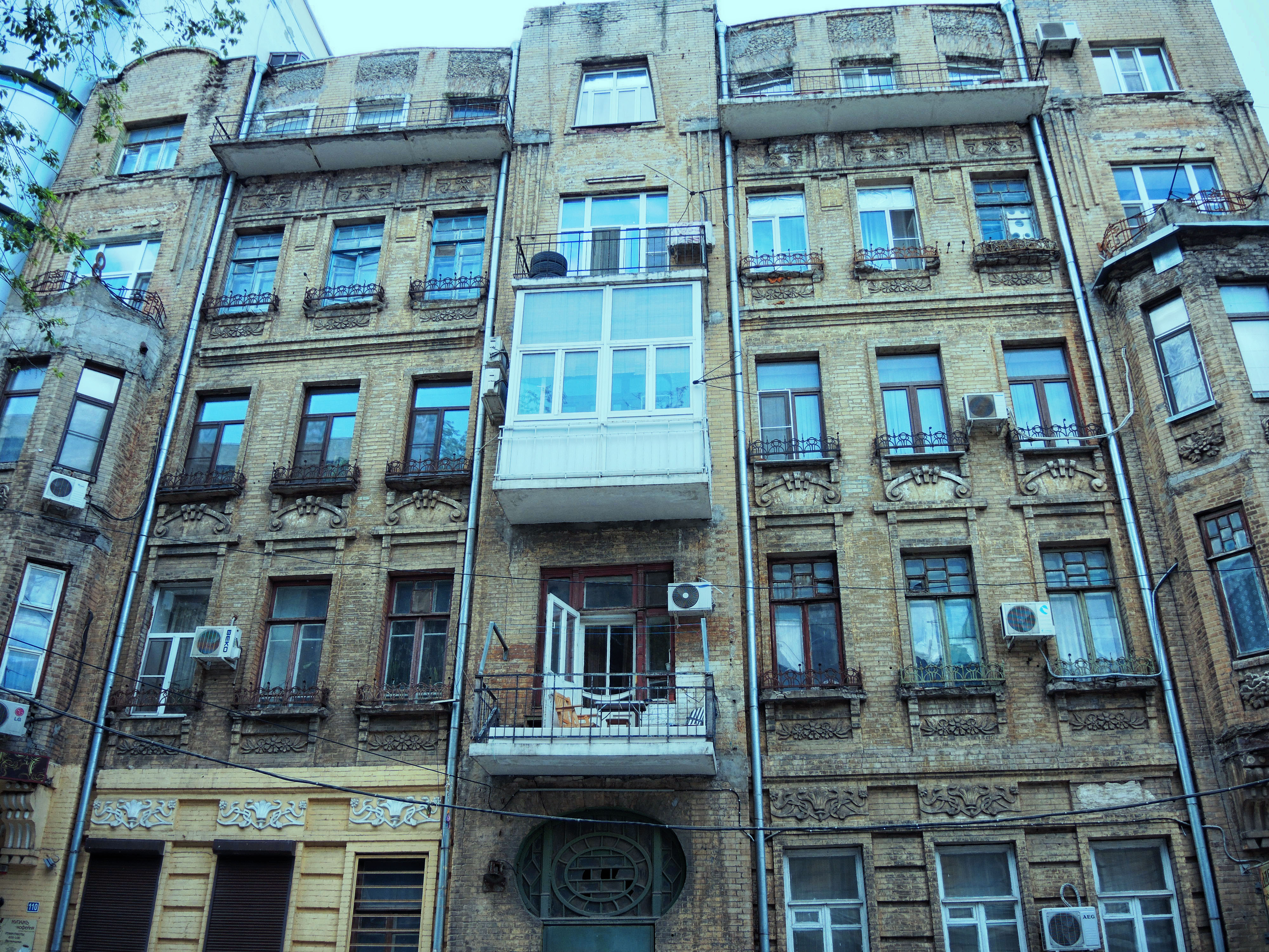 Доходный дом братьев И. и Г. Дерткезовых: улица Шаумяна, 110, литер А, Ростов-на-Дону, Ростовская область